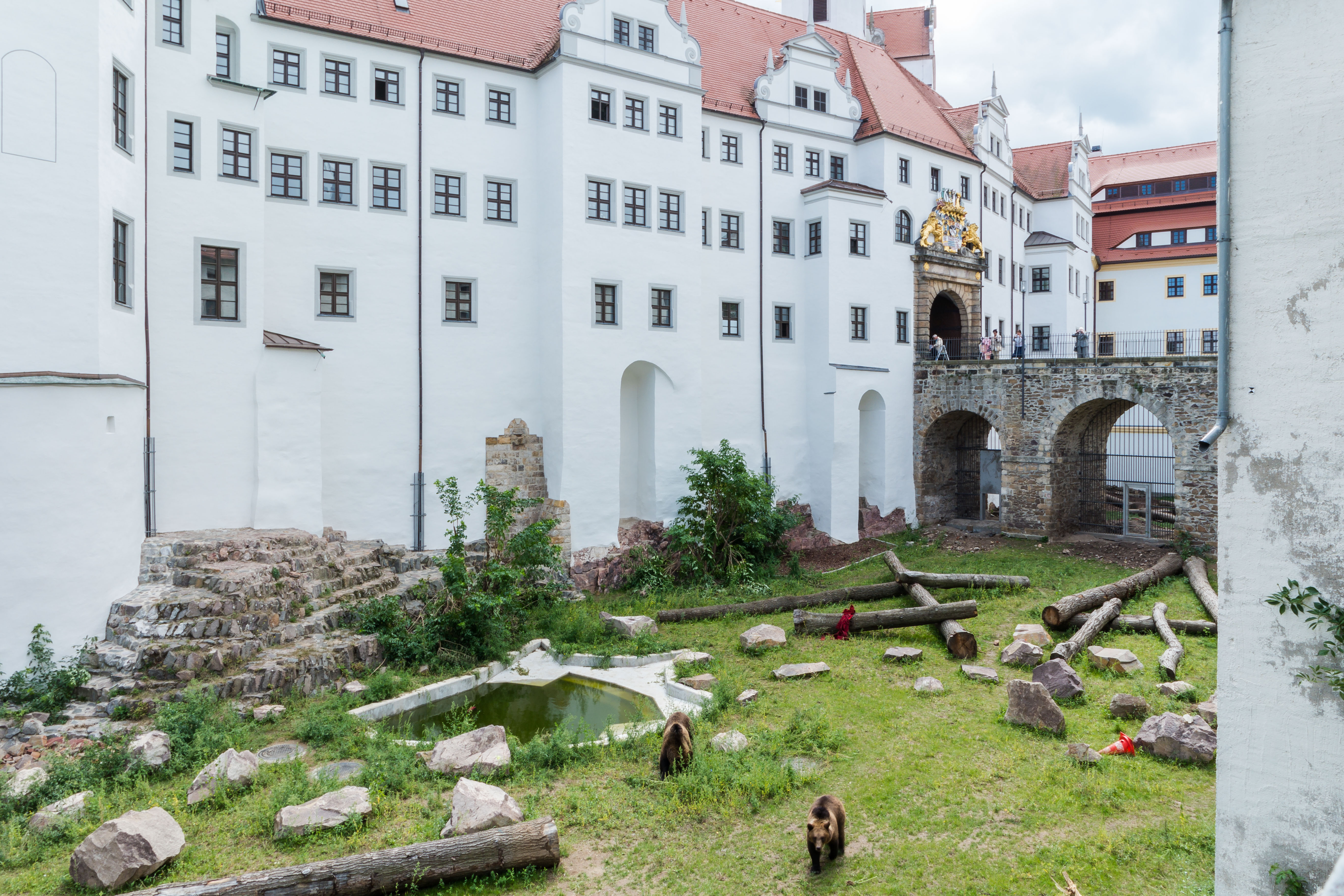 Torgau, Schloss Hartenfels Bärengraben